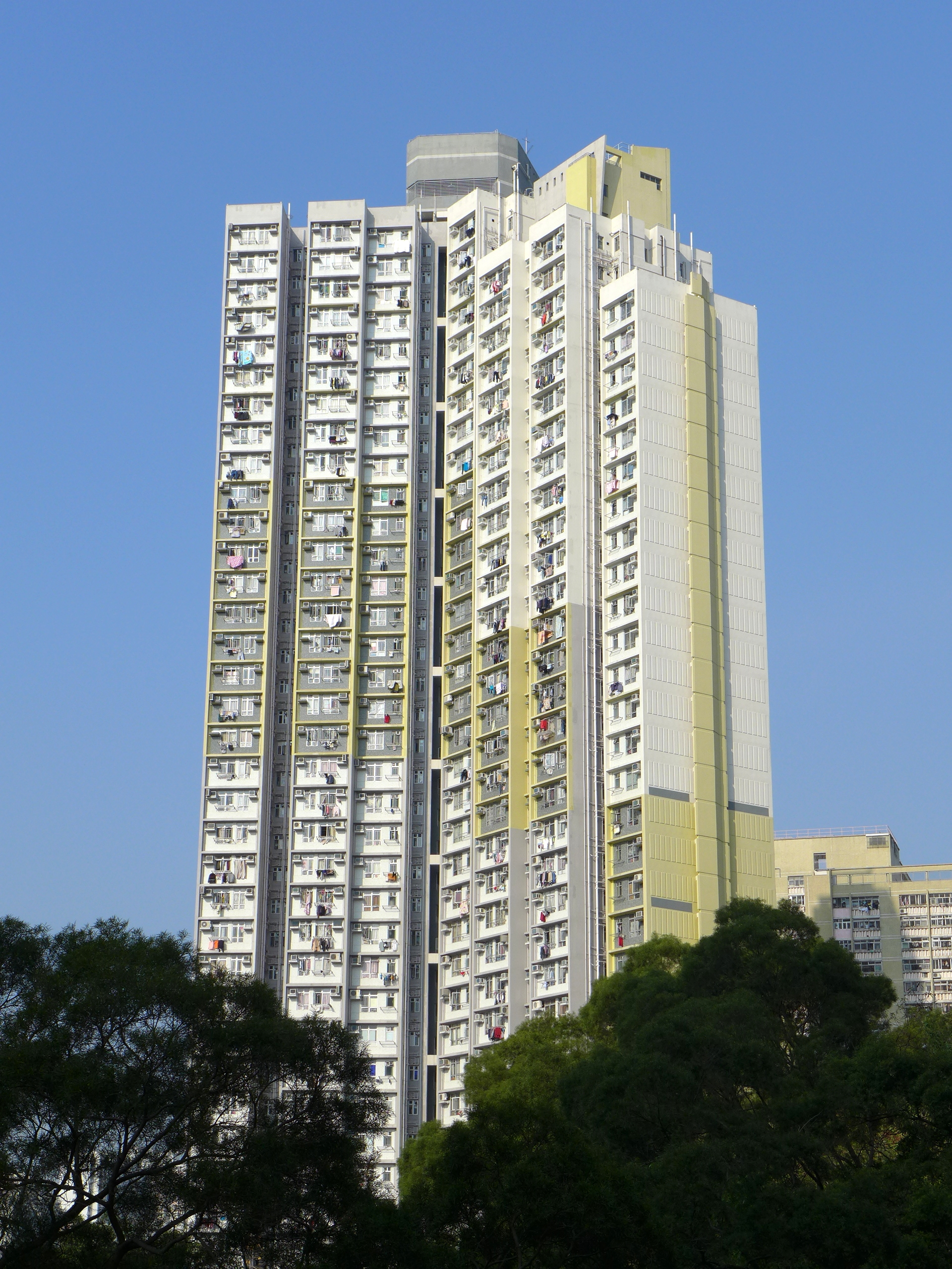 Upper Wong Tai Sin Estate Wing Sin House